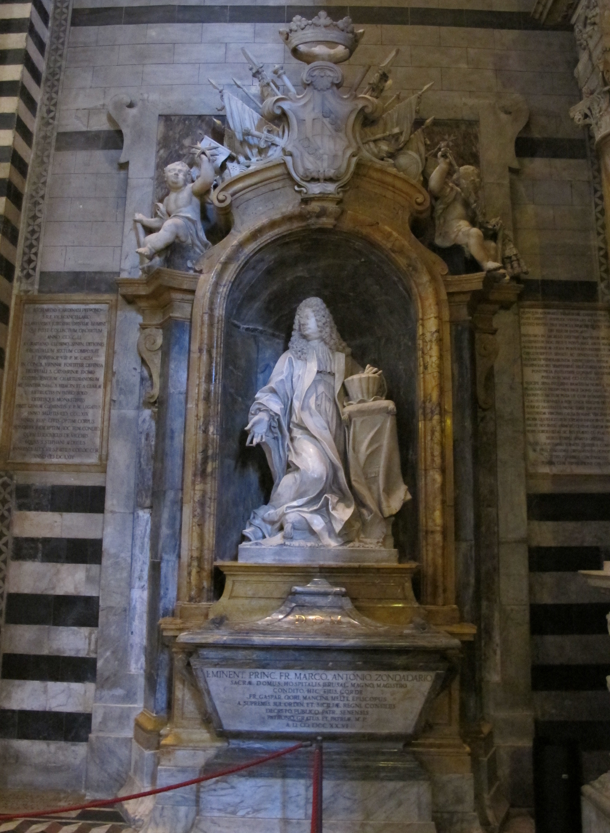 Giuseppe Mazzuoli, monumento sepolcrale di Marc'Antonio Zondadari, 1723-26